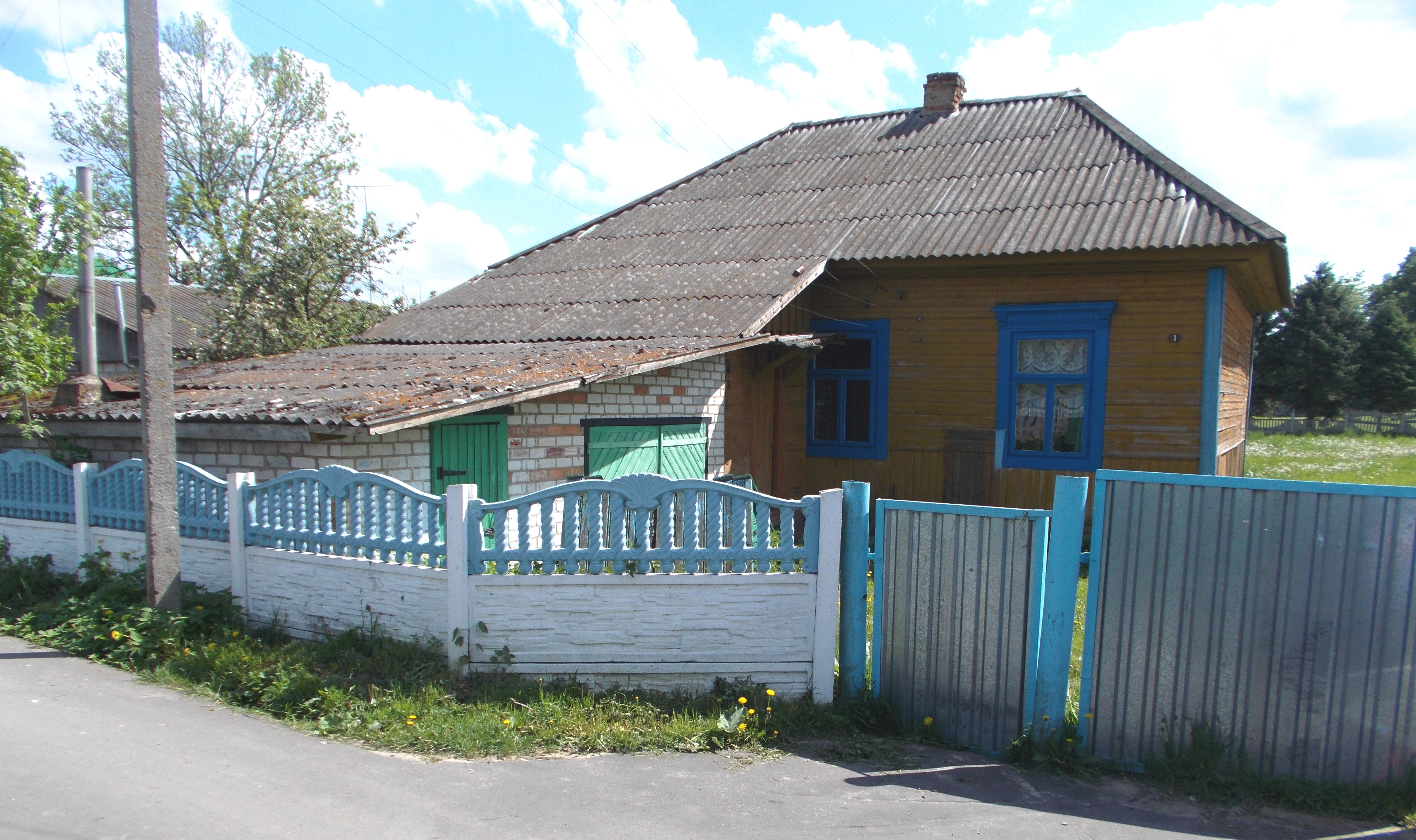 Дом Хаима Вейцмана в городе Мотоль. Переулок Банный, дом 1.